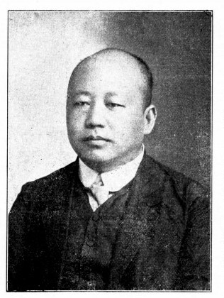 中華民國國會議員